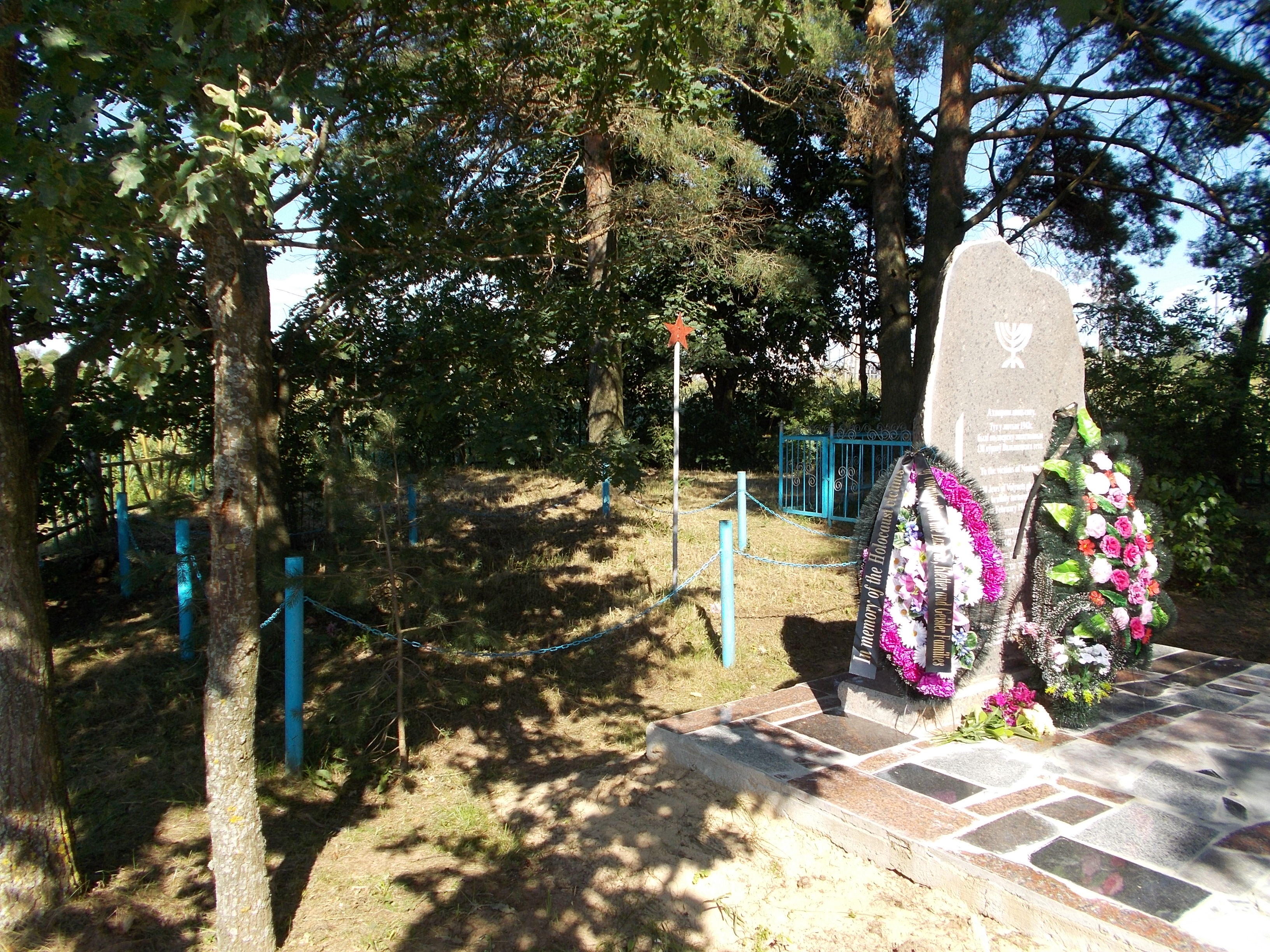 Памятник на месте убийства 130 евреев - узников Волынецкого гетто (Верхнедвинский район). Установлен в 2013 году.